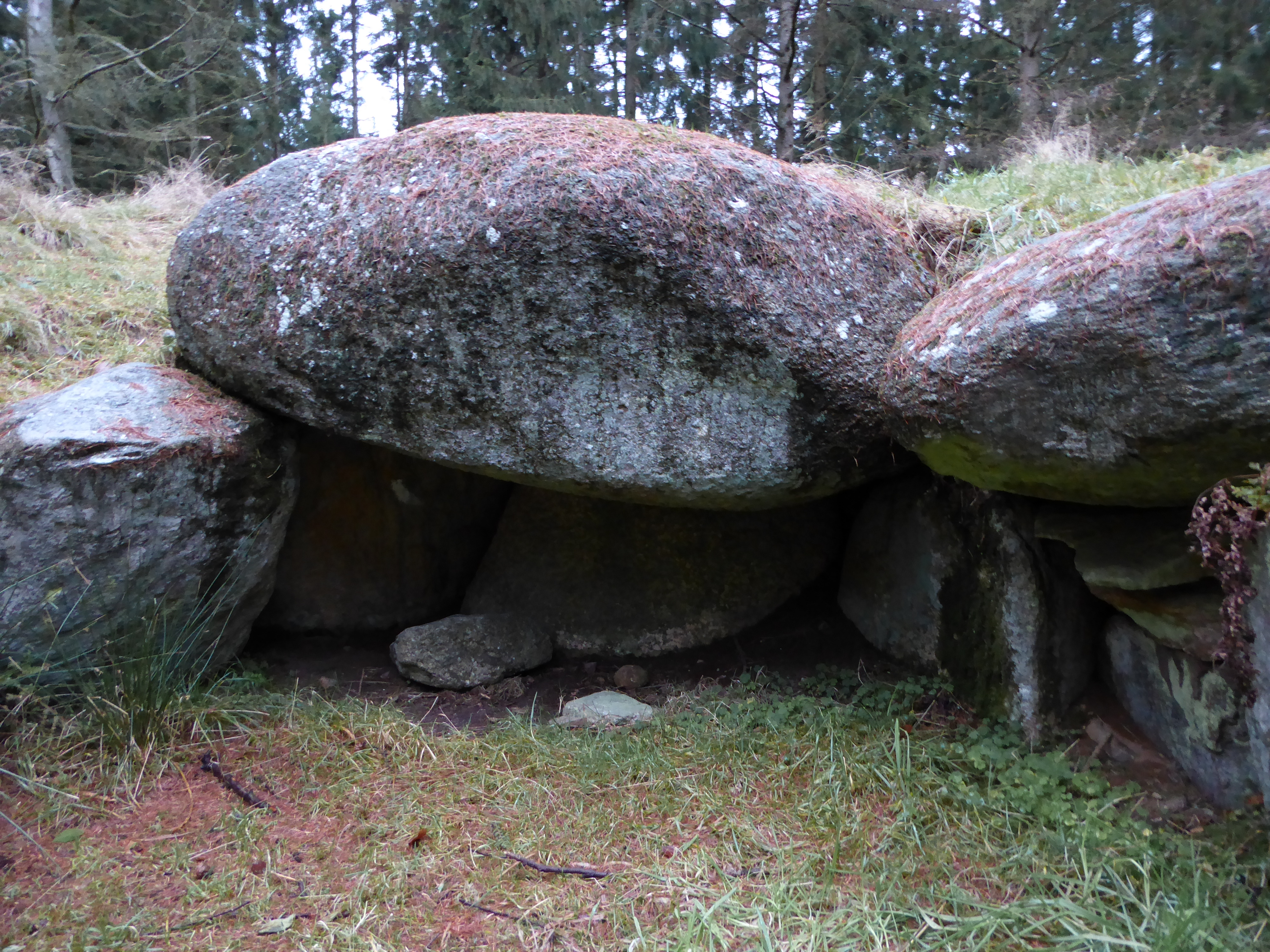 Et kig ind under den tilbageværende dæksten i Røverstuen